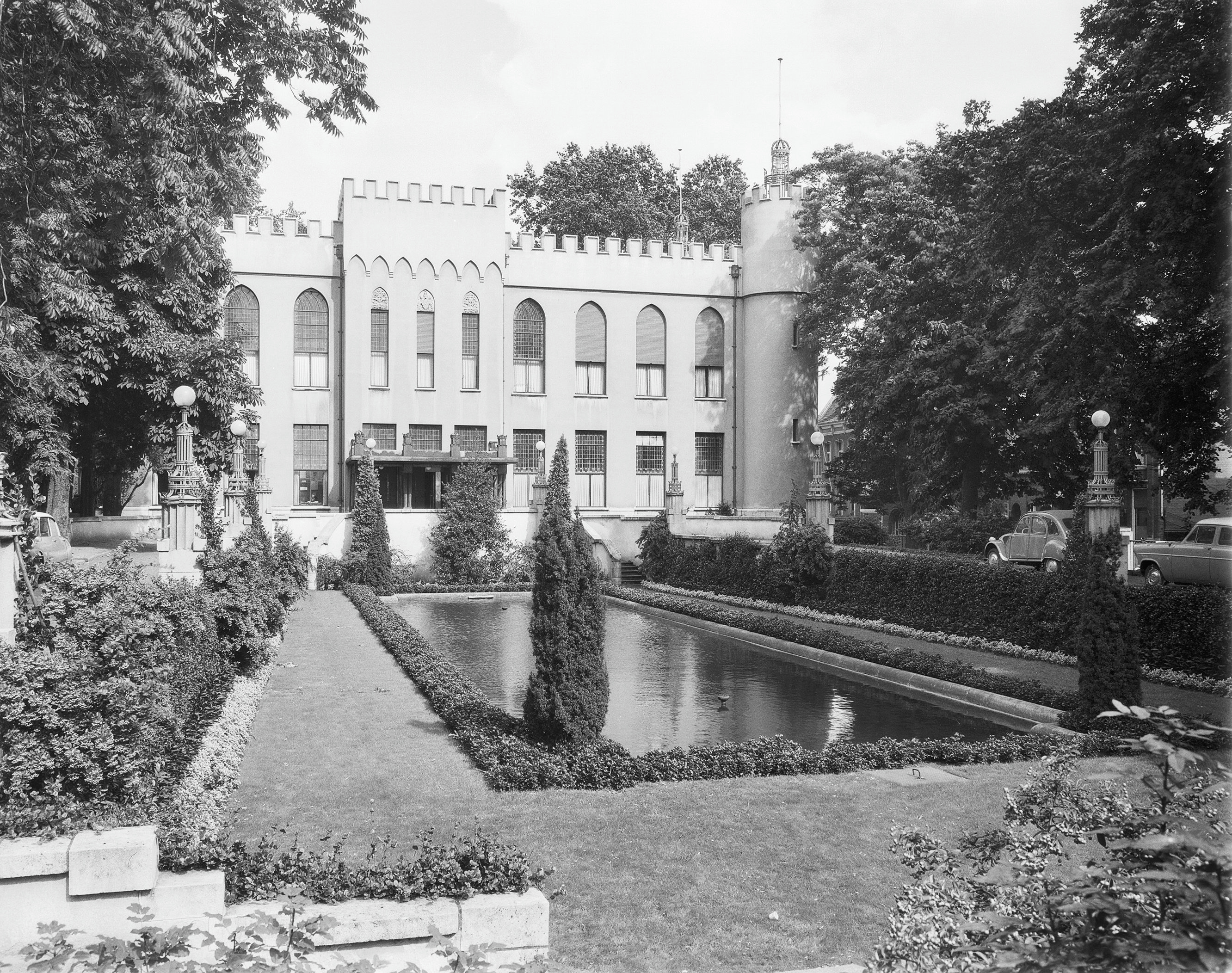 Paleis-Raadhuis: exterieur naar het oosten